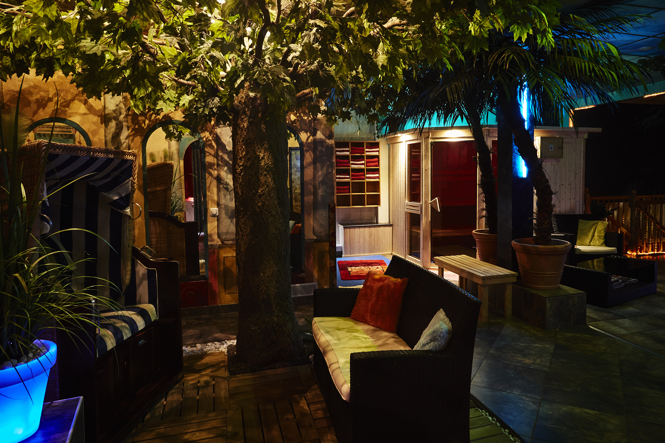 Innenansicht eines Swingerclubs